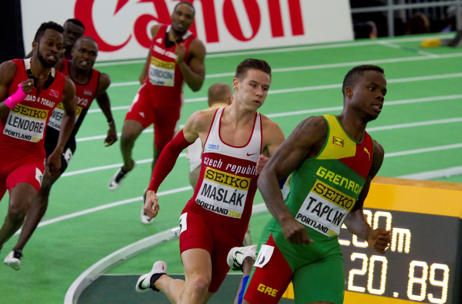 491 finale 400m